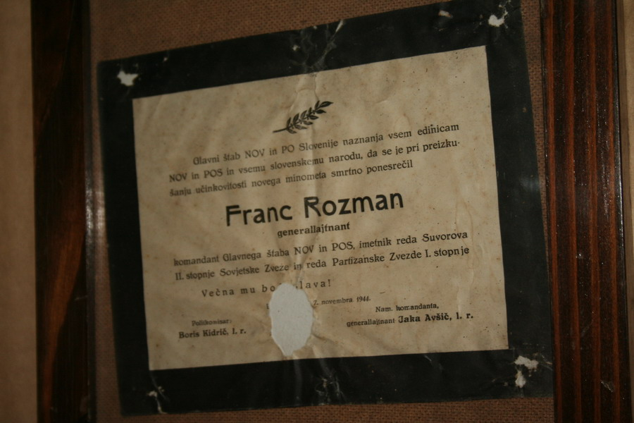 Bolnica Franja